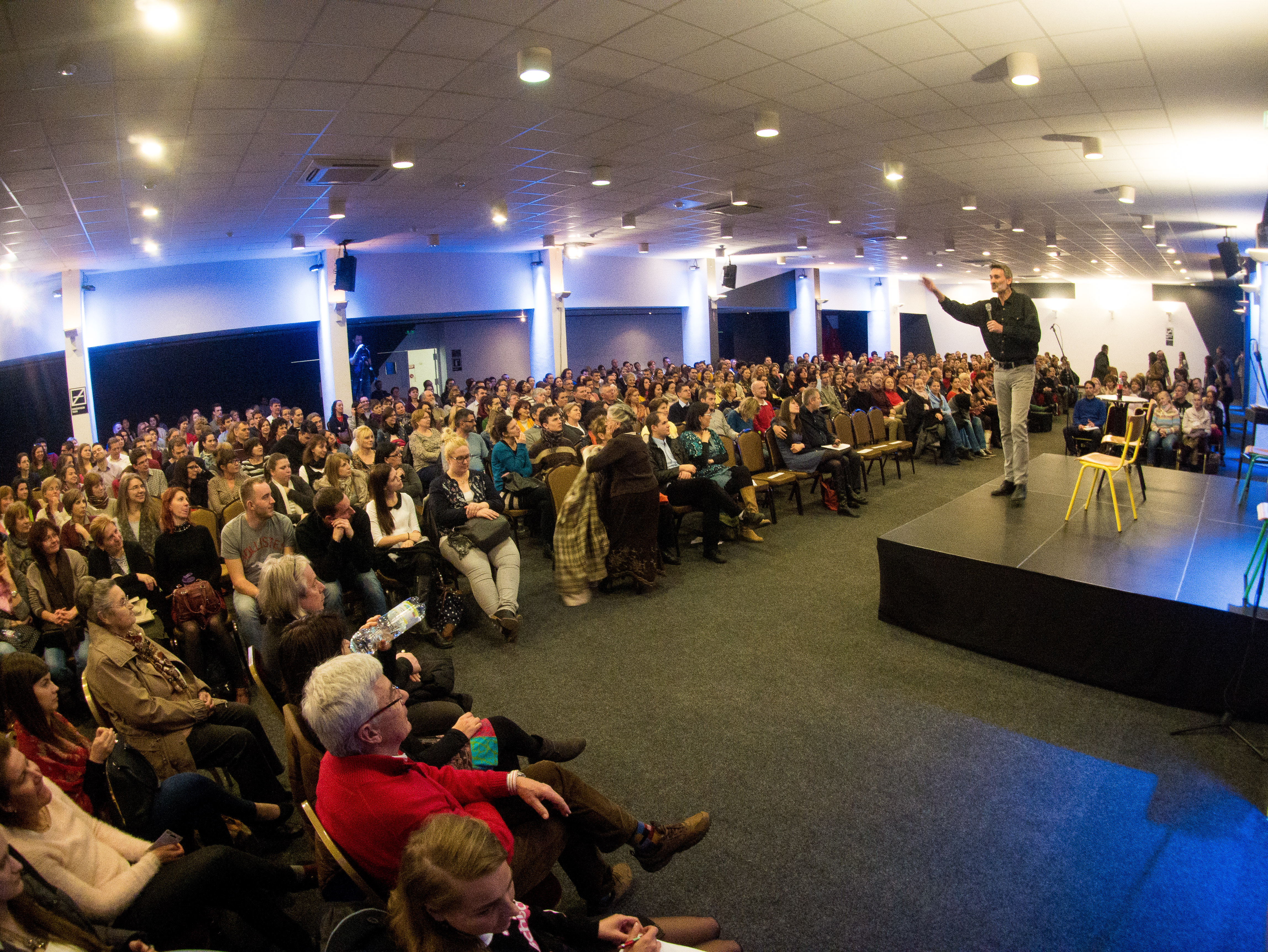 A 2016-2017-es évad alkalmai a Dürer Rendezvényházban kerültek megrendezésre.